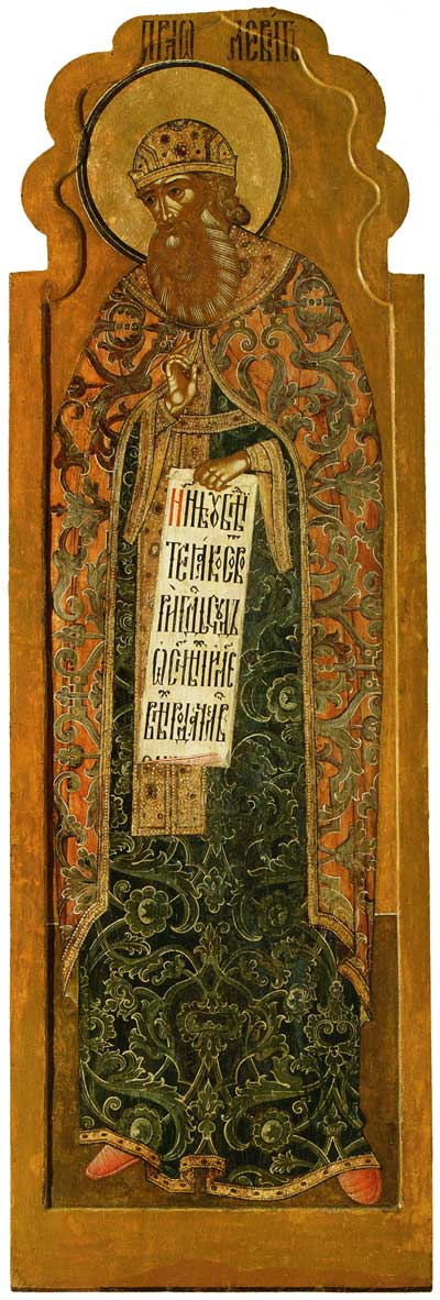 Праотец Леви. Праотеческий чин из главного иконостаса ц. Иоанна Златоуста в Коровниках в Ярославле